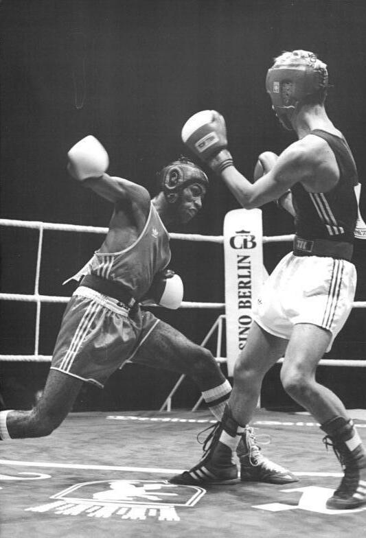 Berlin, TSC-Boxturnier, Frank Sygmund, Enrique Carrion ADN-Bernd Settnik 5.10.90 Berlin: 21. Internationales TSC-Turnier im Boxen-Halbfinalkampf im Bantamgewicht-Der 22jährige Weltmeister von Moskau 1989 und vierfacher kubanischer Landesmeister Enrique Carrion (l.) besiegte den 19jährigen Frank Sygmund (ASk Frankfurt-Oder) mit 37:22 Punkten.